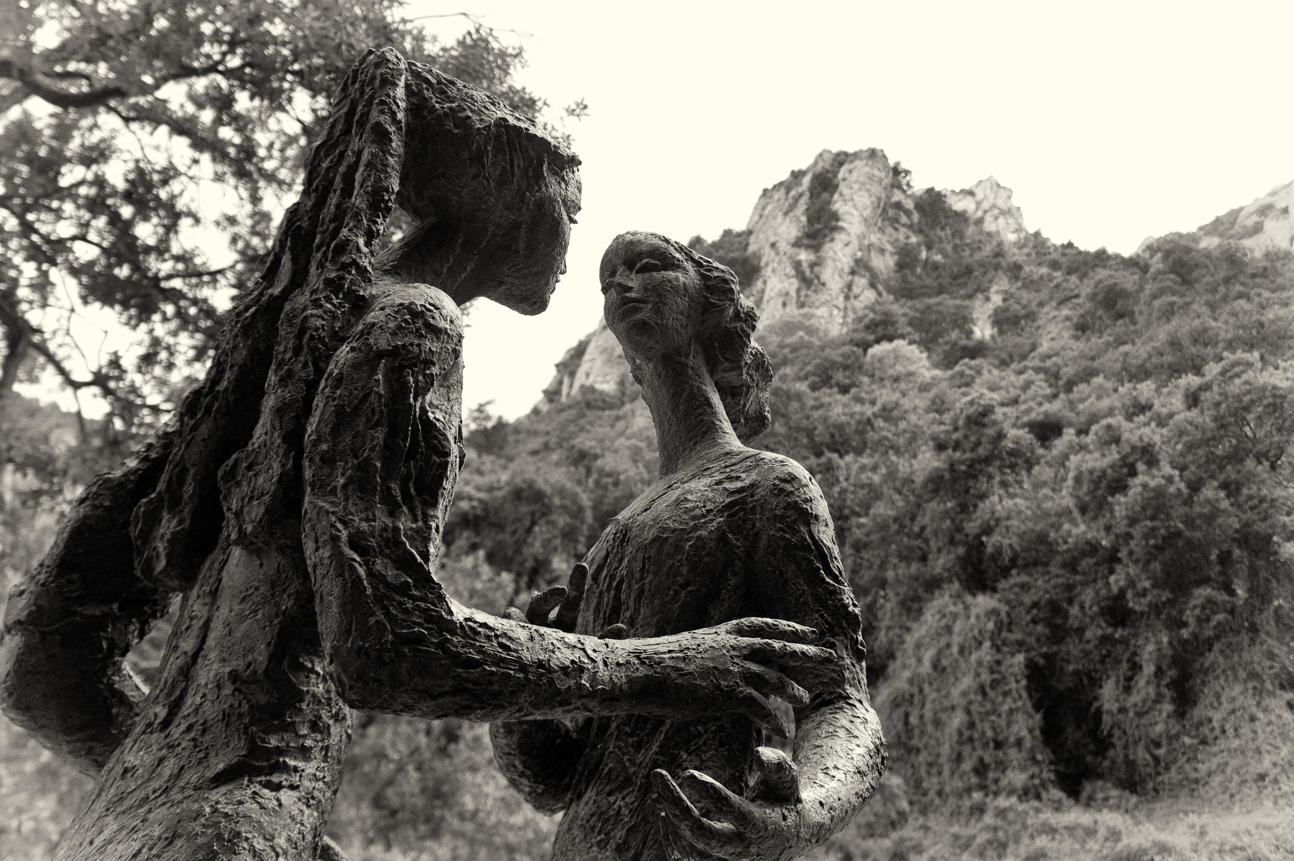 La Visitació de Maria a la seva cosina Isabel. Segon Misteri de Goig del Rosari Monumental de Montserrat. Obra de Venanci Vallmitjana i Barbany